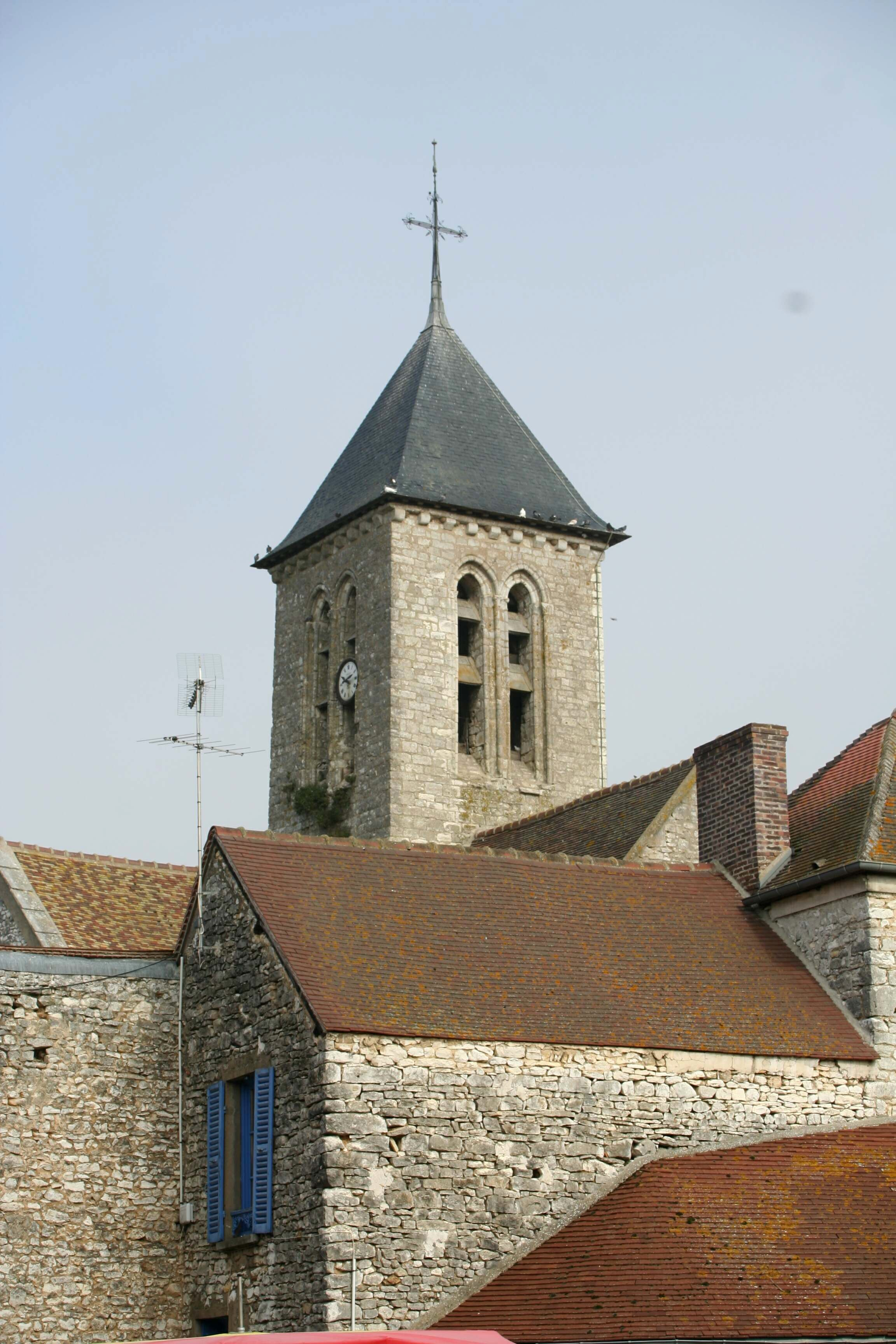 Clocher de l'église de Villiers-en-Désoeuvre - Eure (France)